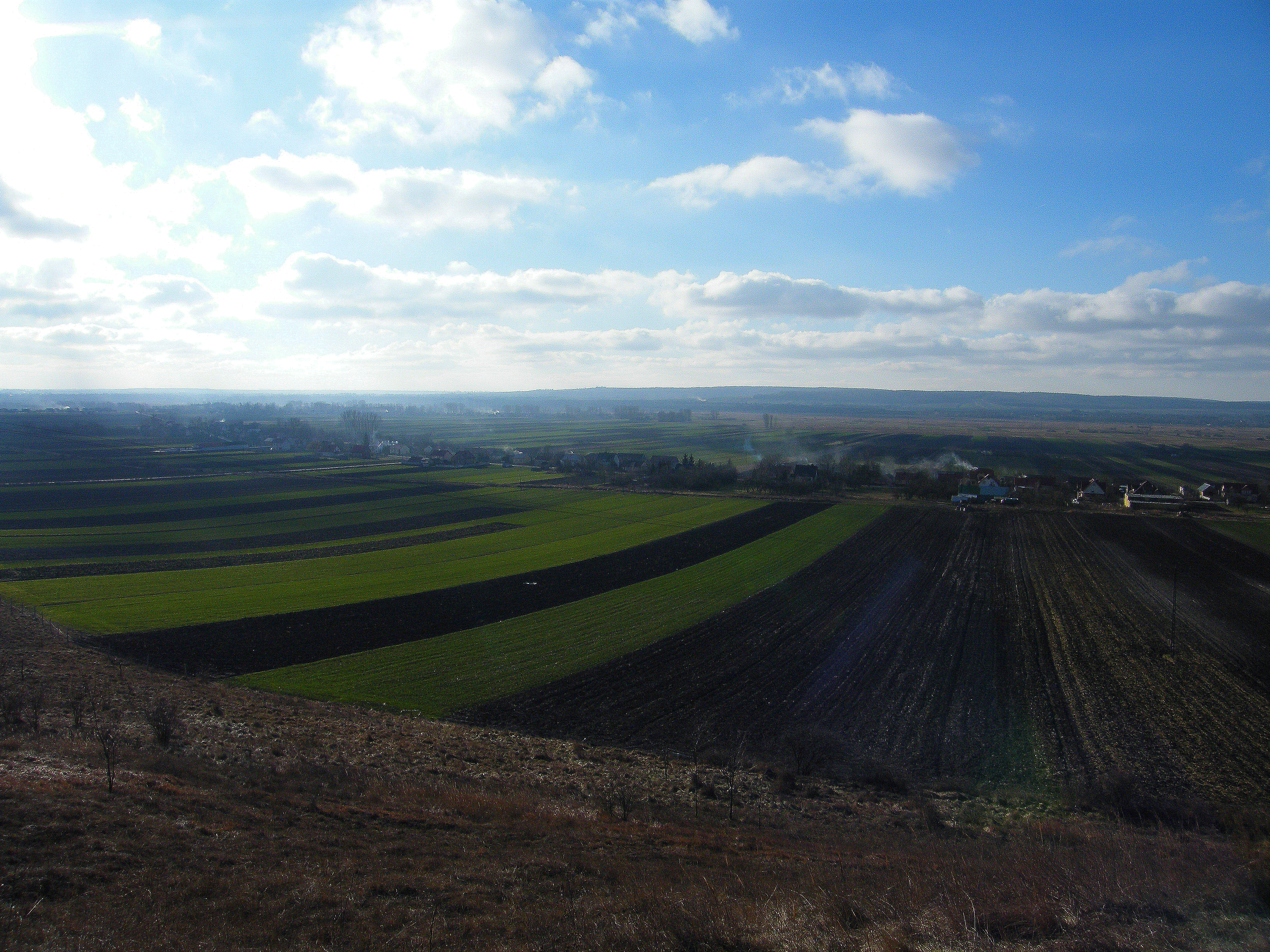 Widok na Wolę Zagojską Dolną ze wzniesień na terenie Woli Zagojskiej Górnej